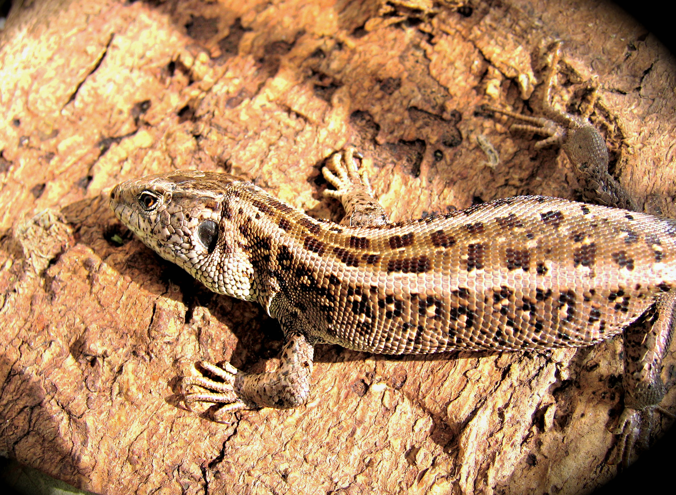 Bild einer weiblichen Zauneidechse, Kopf- Rumpfpartie, auf einer Baumrinde, veranschaulicht schön die Tarnwirkung der Färbung